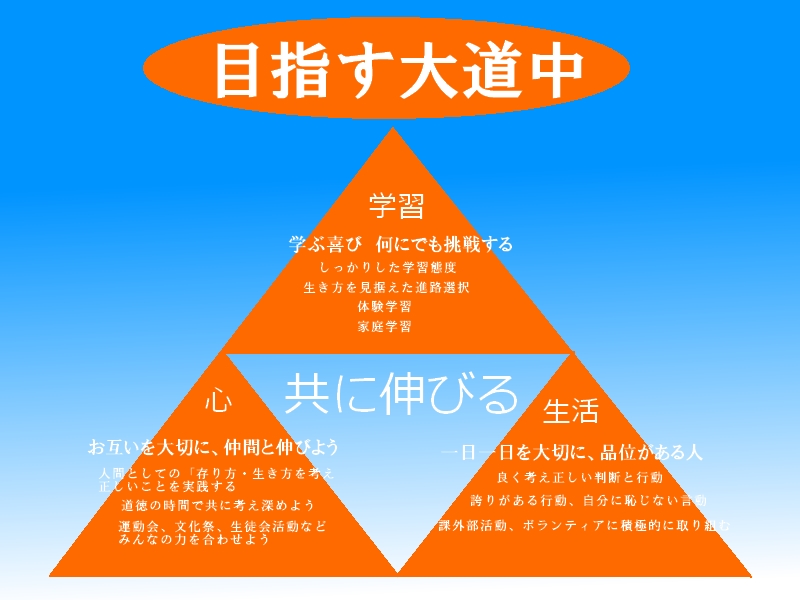 めざす大道中訂正版